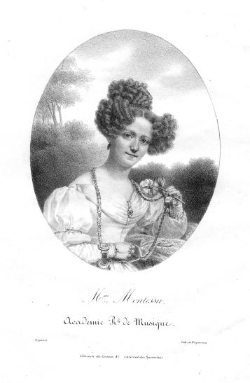 Madame Montessu, Académie royale de Musique, lithographie de Vigneron, 1825